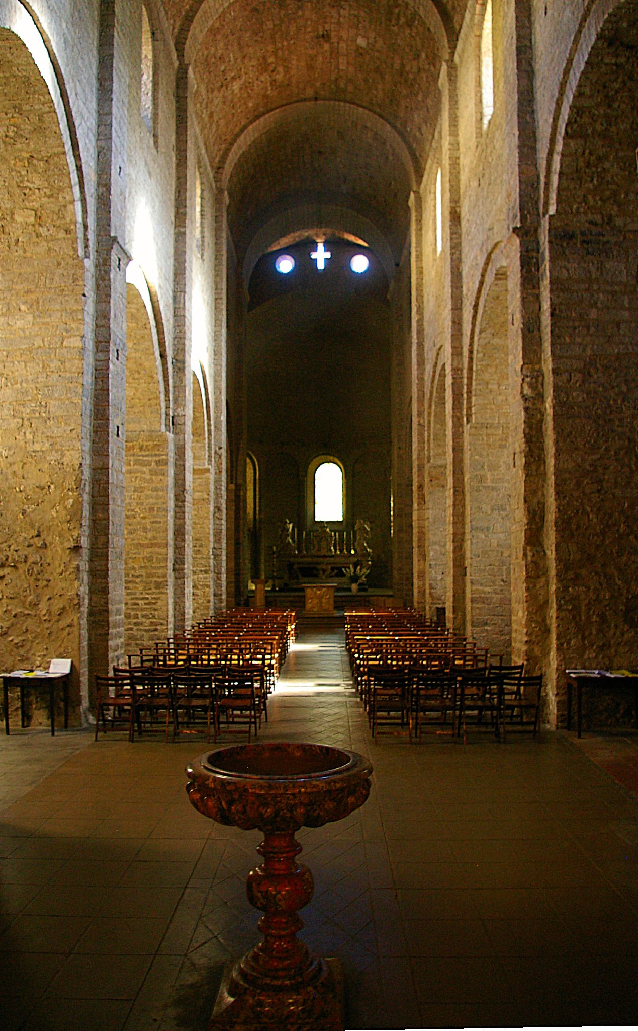 Saint-Guilhem-le-Désert, Hérault, France - nef de l'abbatiale.